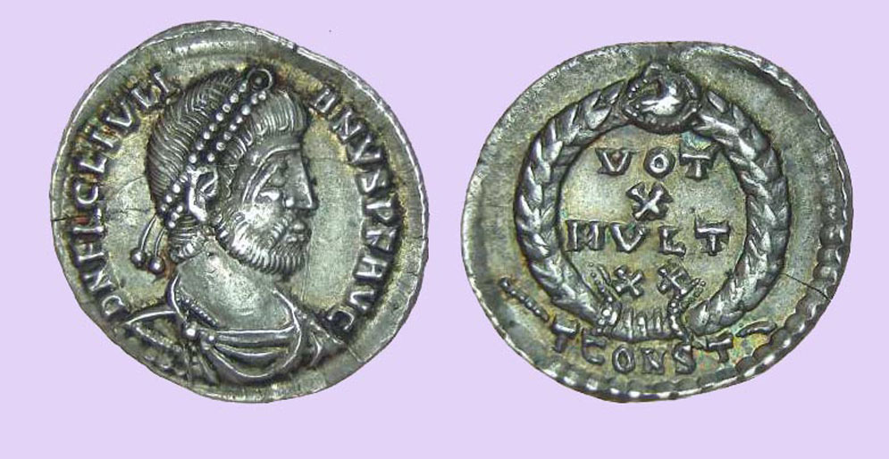 Siliqua (argento) gr. 2,0; Flavio Claudio Giuliano